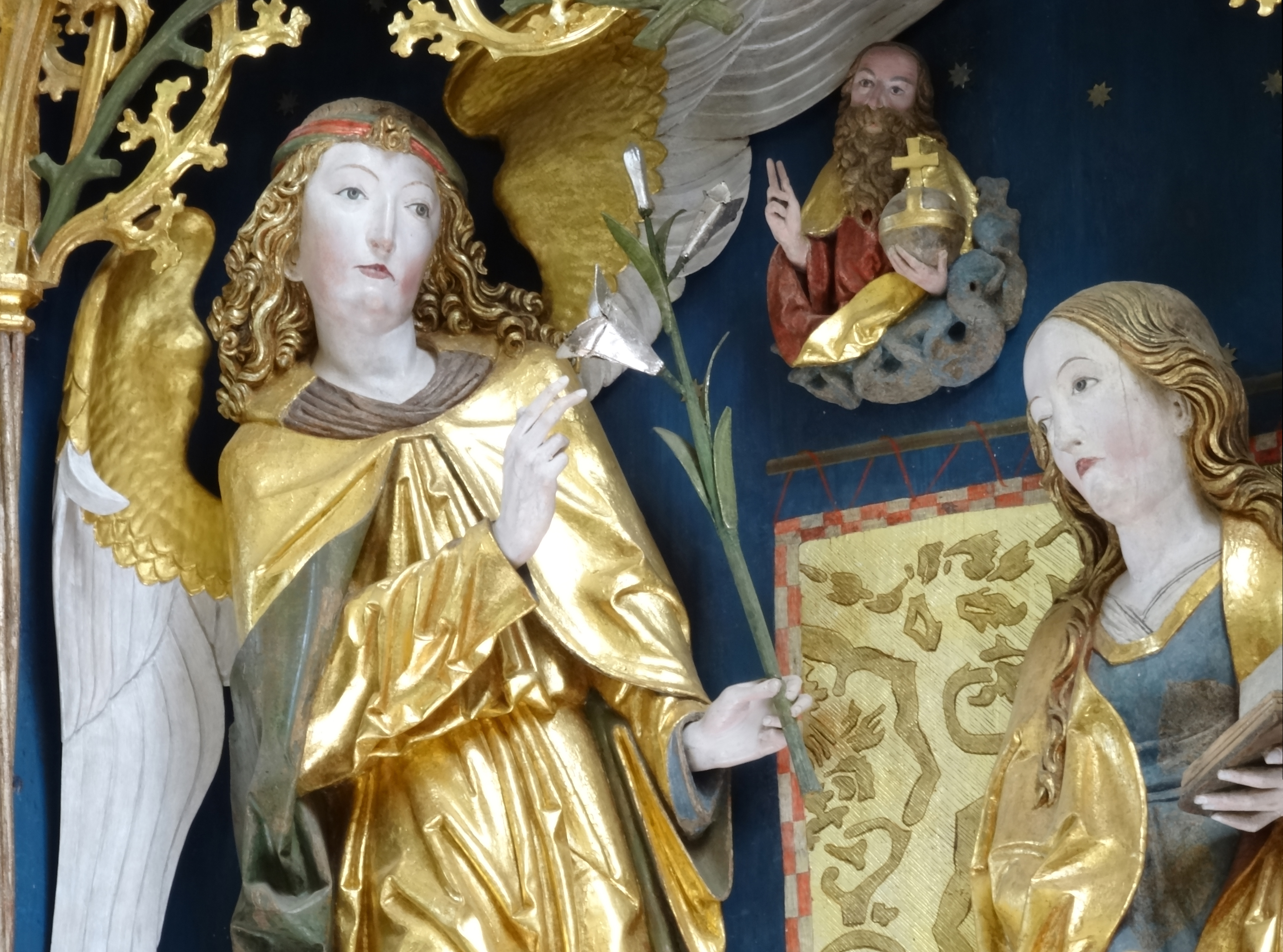 St. Leo (Bibra), der Verkündigungsengel Gabriel überbringt Maria die freudige Botschaft